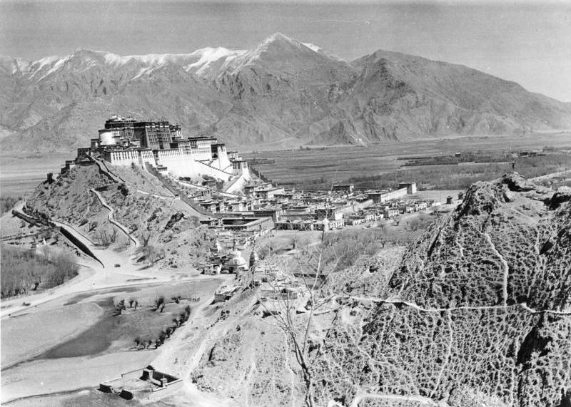 Tibetexpedition, Blick auf Lhasa und Potala Lhasa mit Potala (zweiteiliges Panorama)